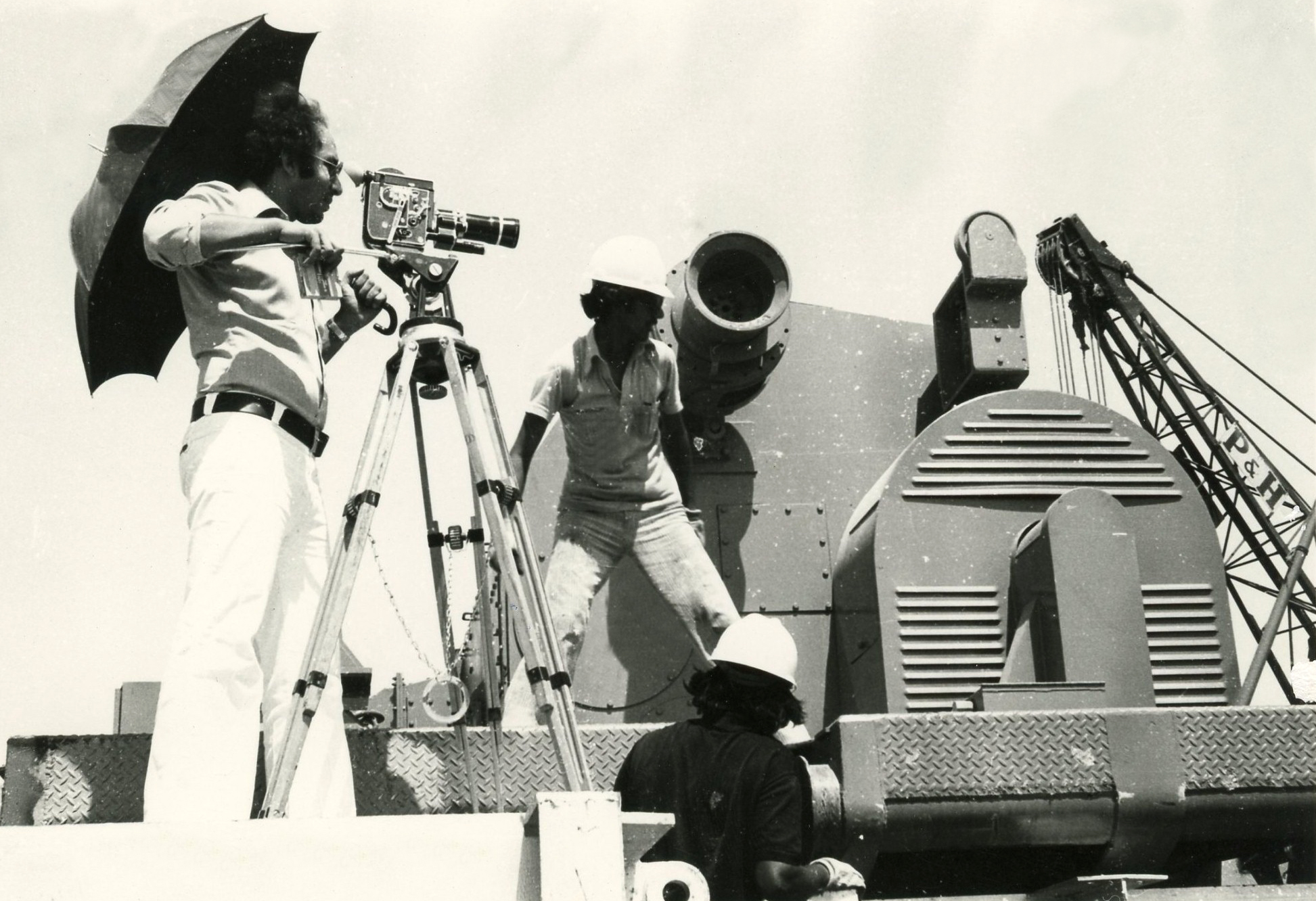 قام الفاروق بإنتاج وإخراج ثلاثة أفلام لشركة نفط الكويت بين عامي 1976 و1978